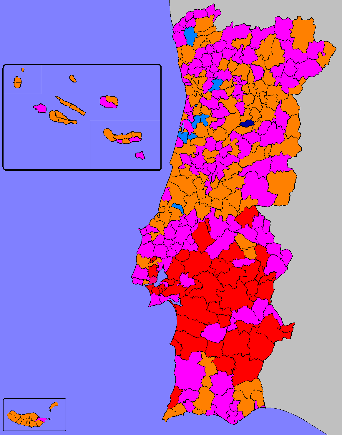 Mapa ilustrativo do partido mais votado por Concelho (Câmara Municipal)